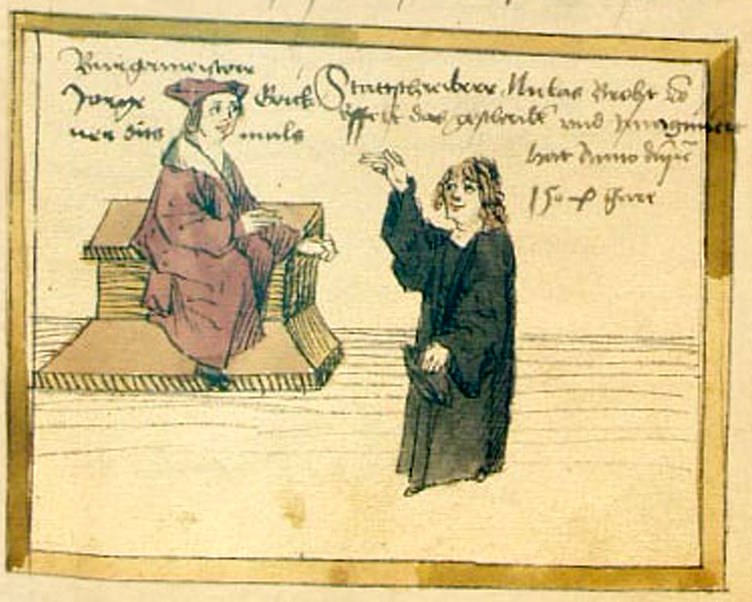 Stadtschreiber Niklas Brobst von Effelt leistet vor dem Magister Civium seinen Amteid ab.